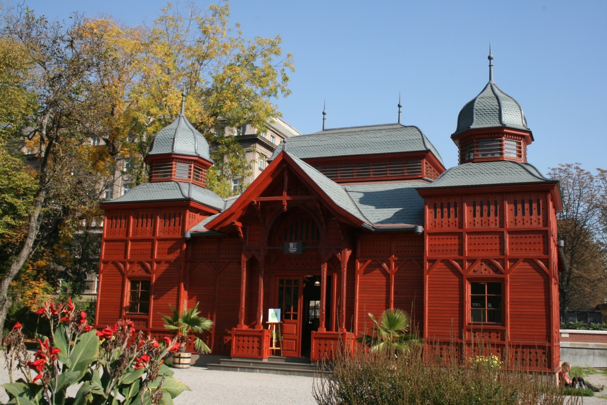 Izložbeni paviljon botaničkog vrta PMF-a